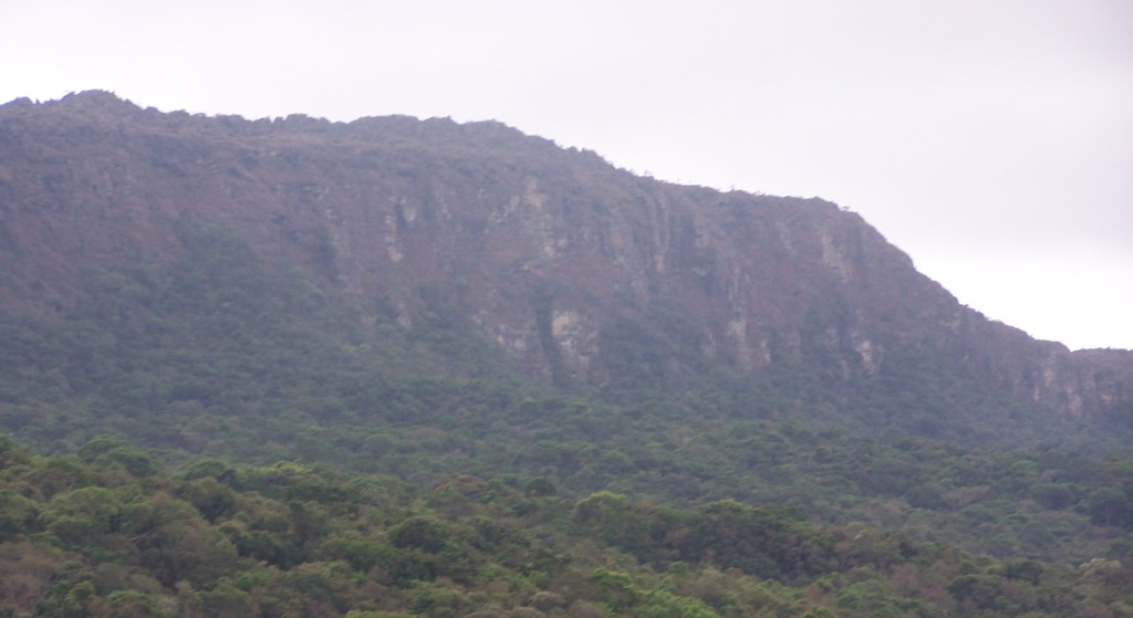 Serra de São José, Tiradentes - MG, Brasil.